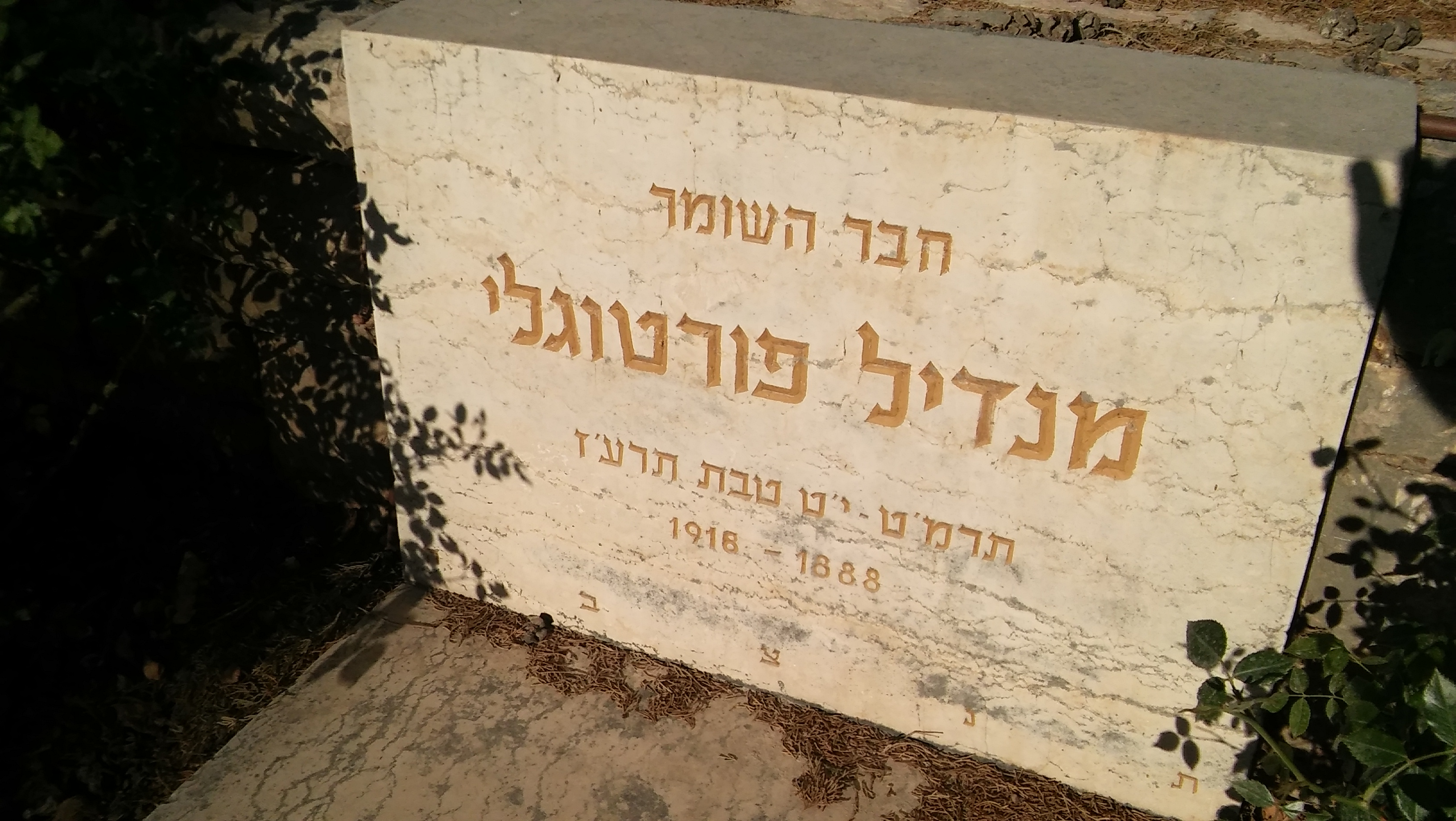 המצבה של מנדל פורטוגלי בחלקת השומר בבית הקברות של כפר גלעדי